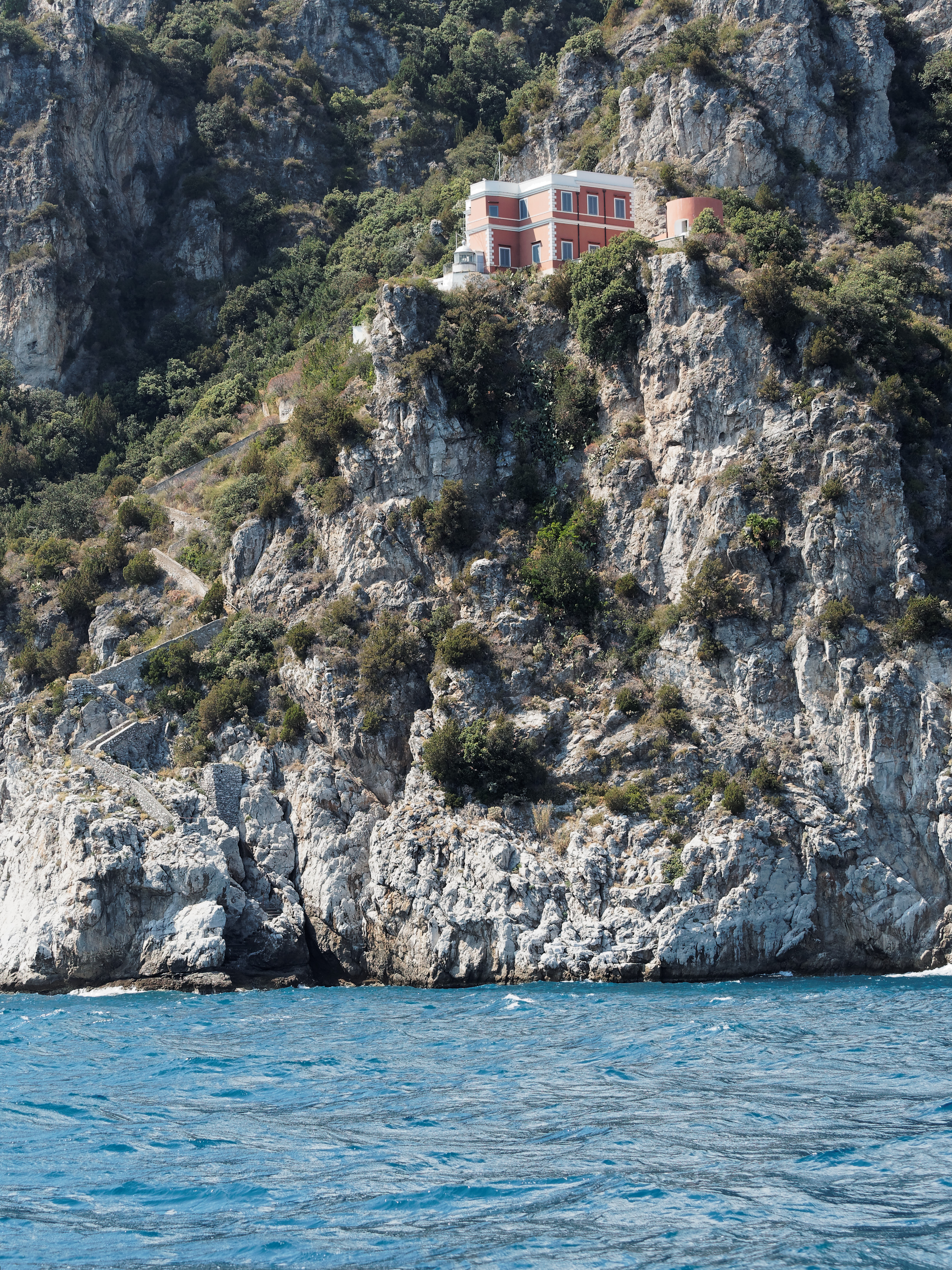 Das Leuchtfeuer Faro di Capo d'Orso bei Maiori auf der Amalfi-Halbinsel, Kampanien, Italien bei Tag